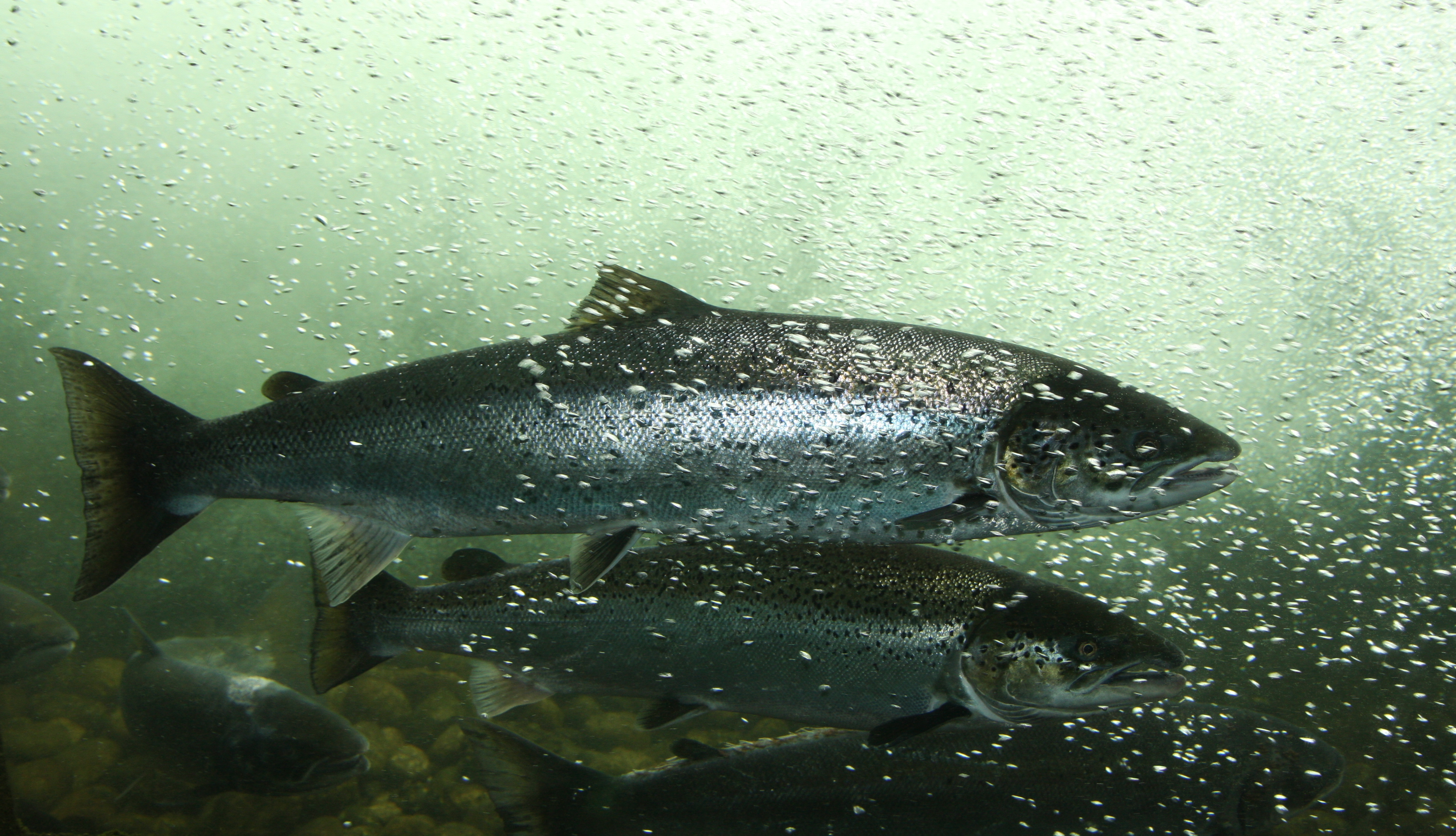 Laks i laksetrappa i Suldalslågen i Suldal